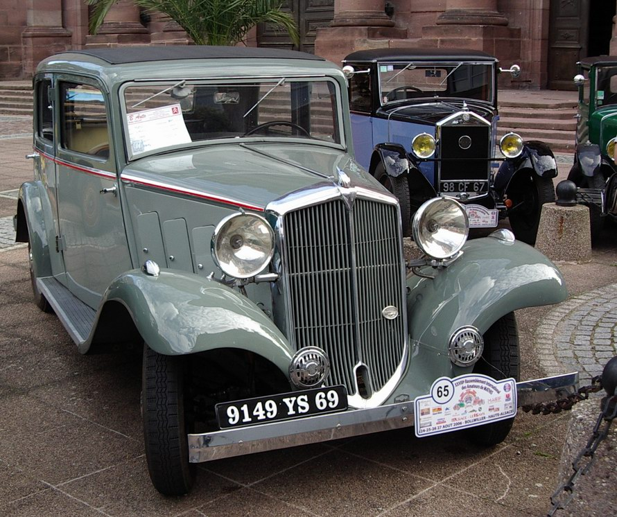 Mathis EMY4S (1933), voiture française Author: Rémi Stosskopf Date: 25 august 2006